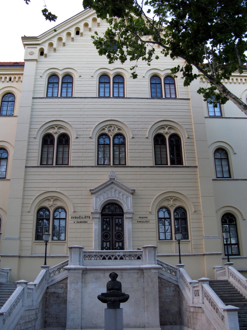 Pravni fakultet, Zagreb